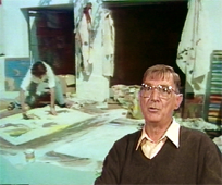 Portrait de Marcel Alocco